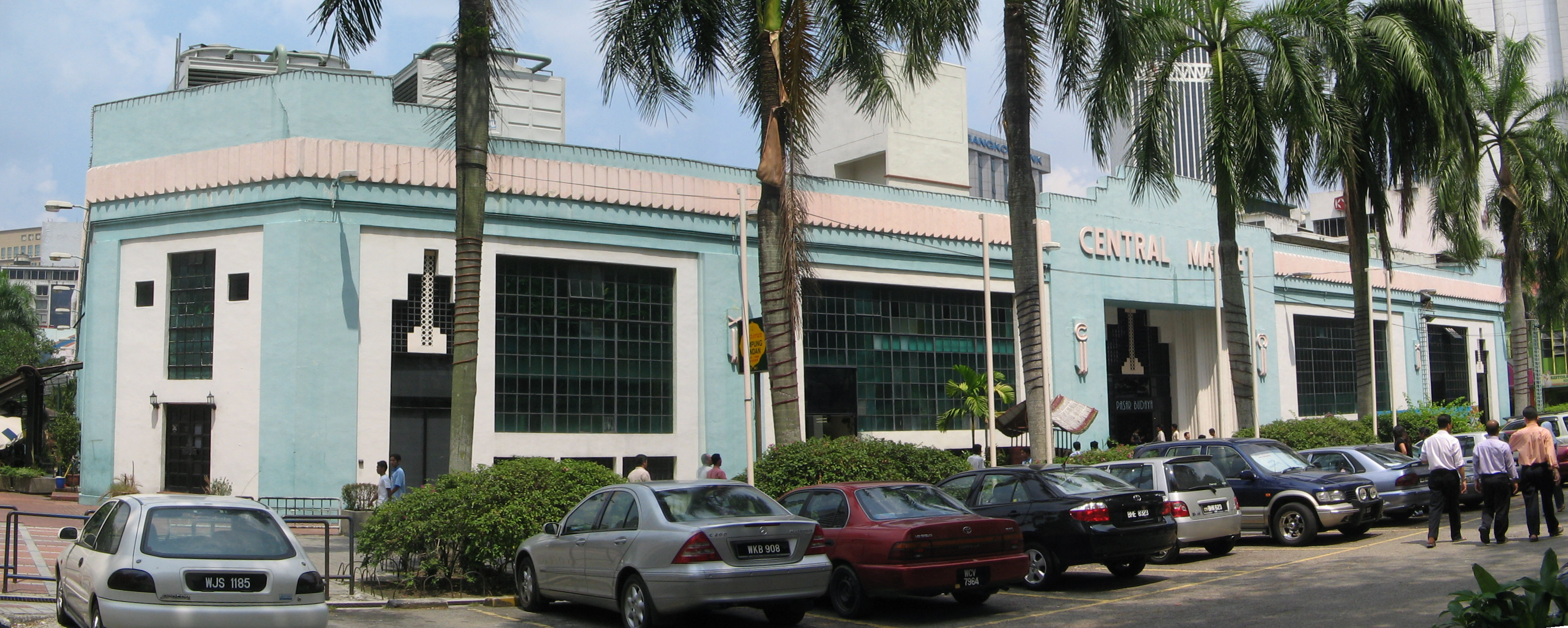 Bangunan pasar seni 2005 @ Mohamed Yosri